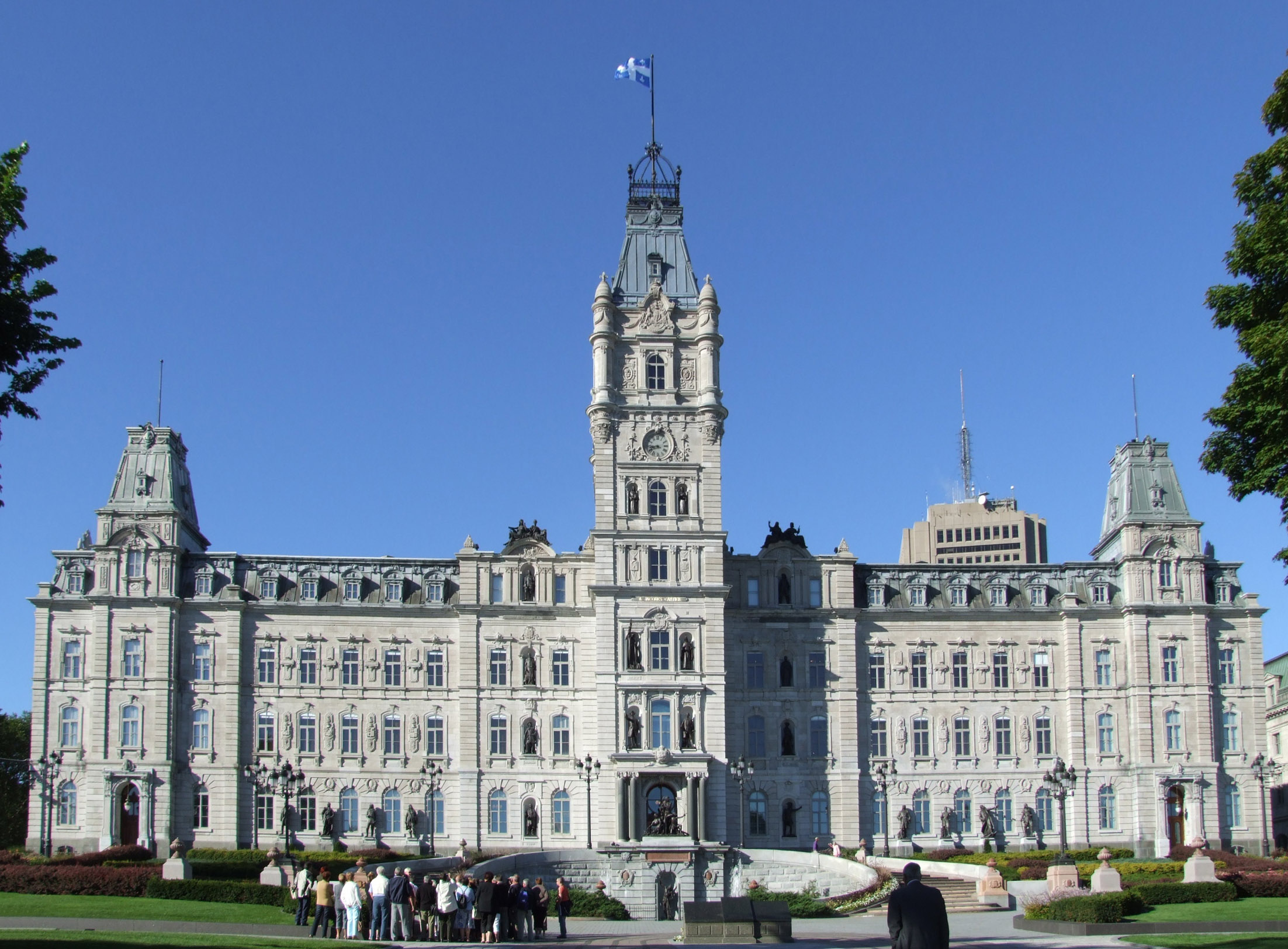 Hôtel du Parlement, Québec, Québec, Canada